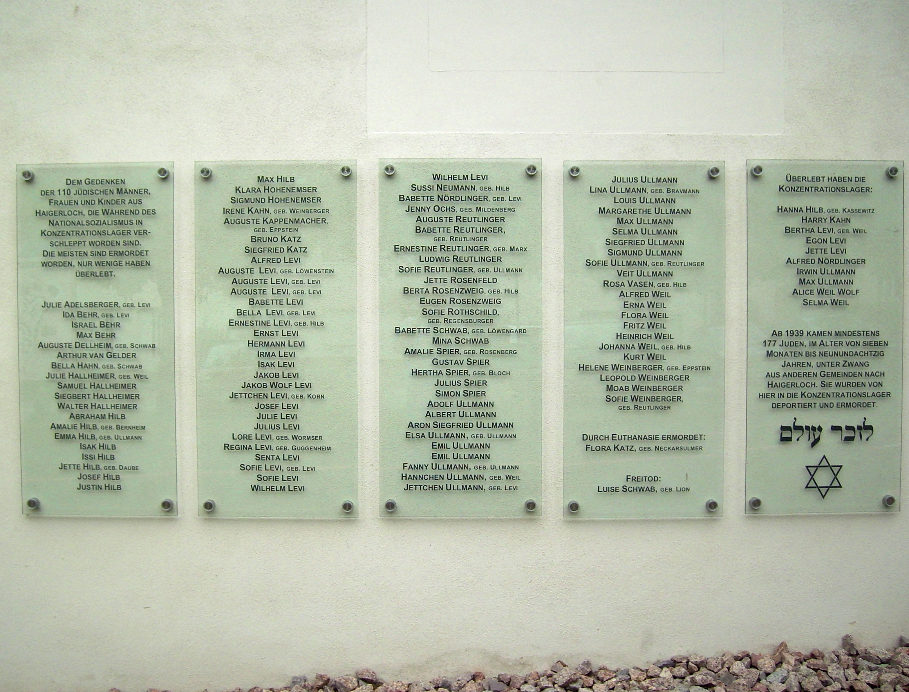 Haigerloch Gedenktafel für die verschleppten und ermordeten jüdischen Bürger Haigerlochs an der Alten Synagoge